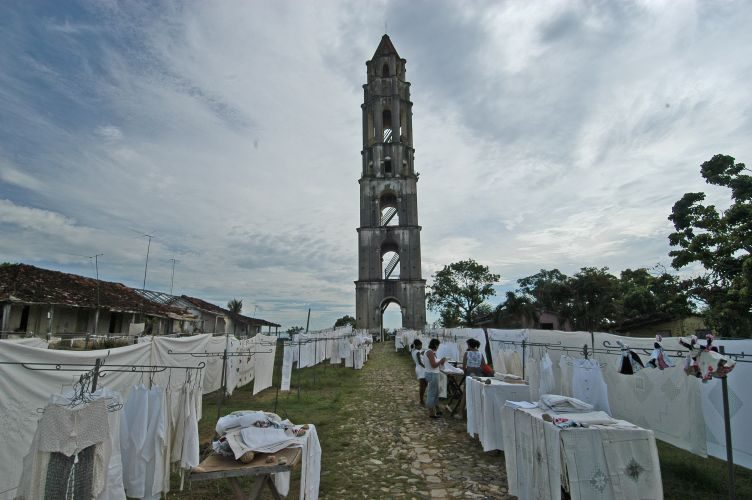 Cuba, september 2005, info in de Metadata